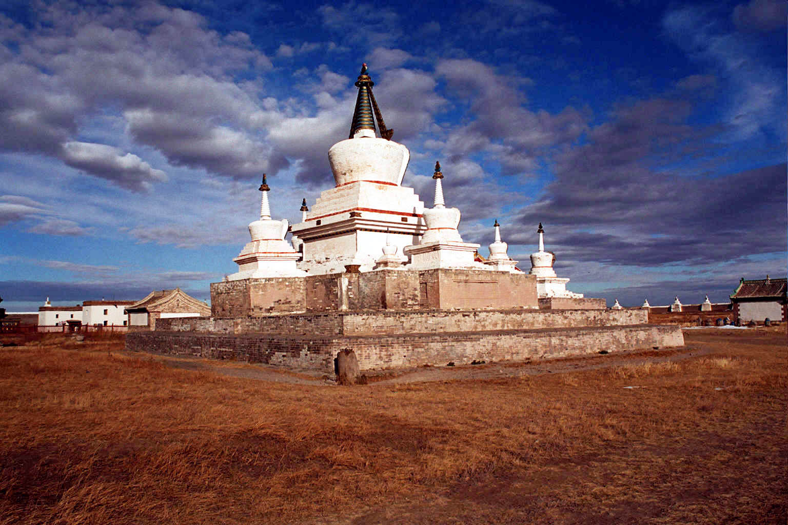 Monastère d'Erdene Zuu en Mongolie.